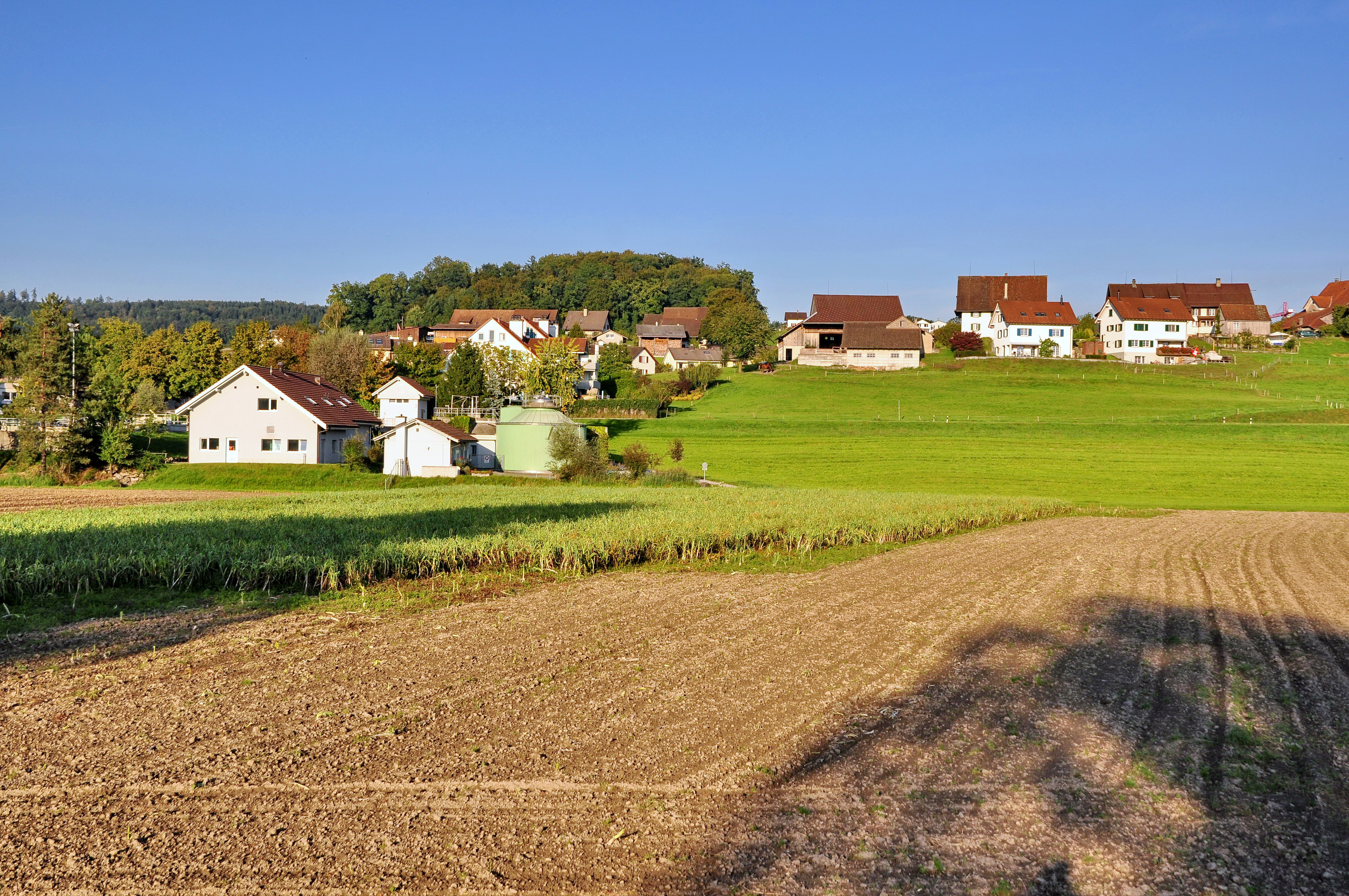 Lunnern in Obfelden (Switzerland)